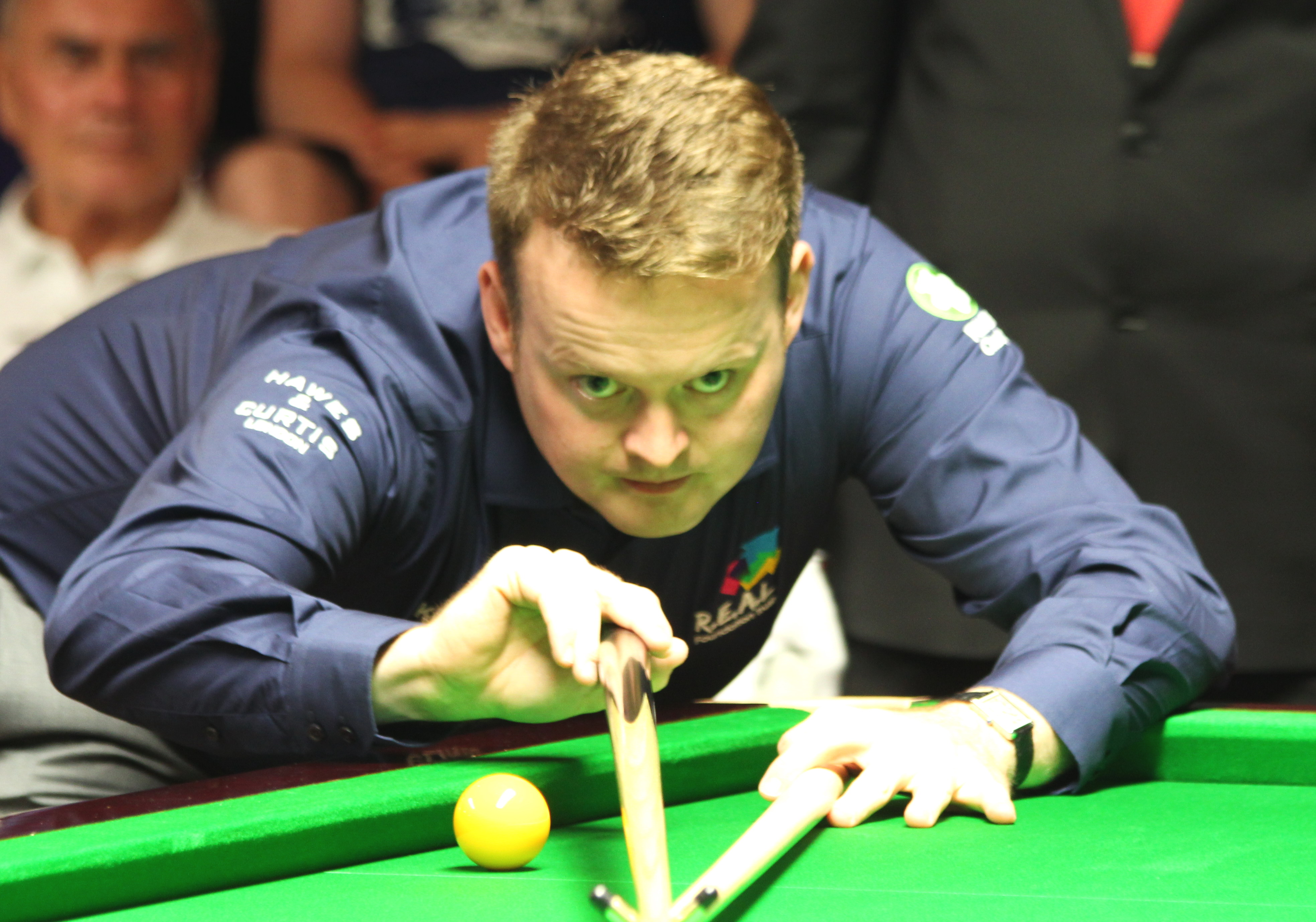 Shaun Murphy beim Paul Hunter Classic 2015